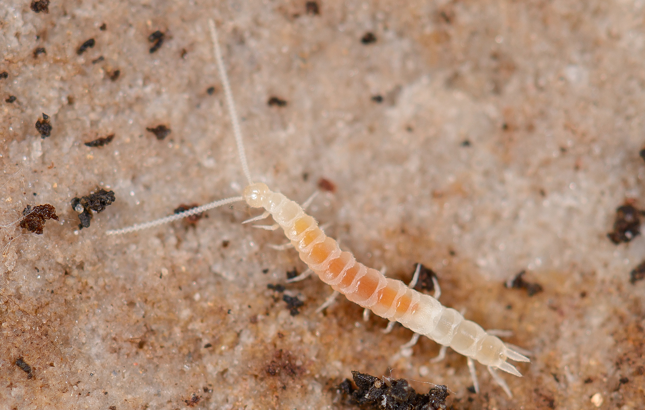 symphylan